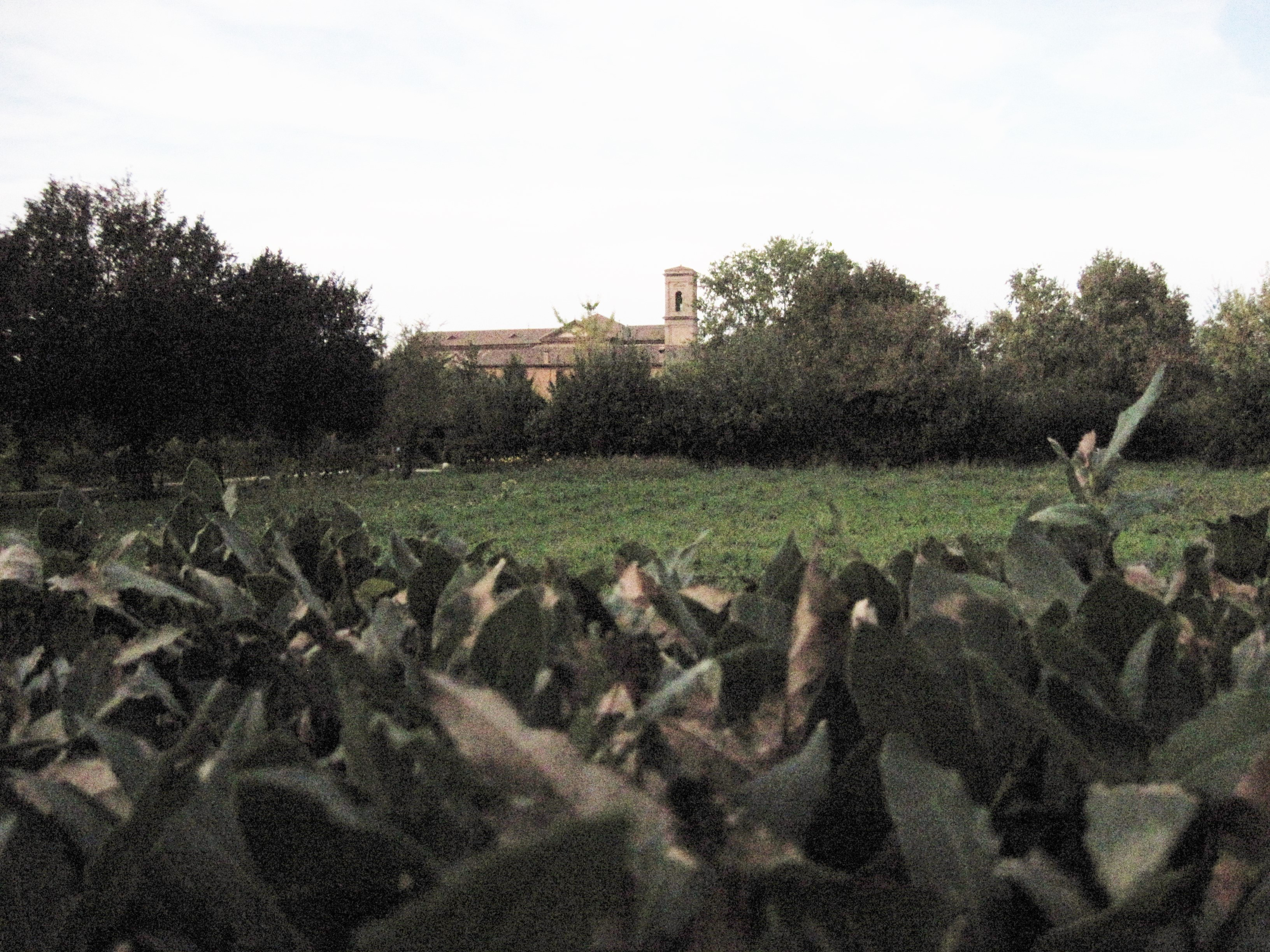 Via delle Vigne, a Ferrara, percorre l'ultima area urbana ancora non pienamente utlizzata per la costruzione di edifici. Si trova nel settore nord est della città, e divide idealmente la Certosa cattolica dal Cimitero ebraico in uno spazio pieno di verde e di residue attivitò agricole entro le mura.